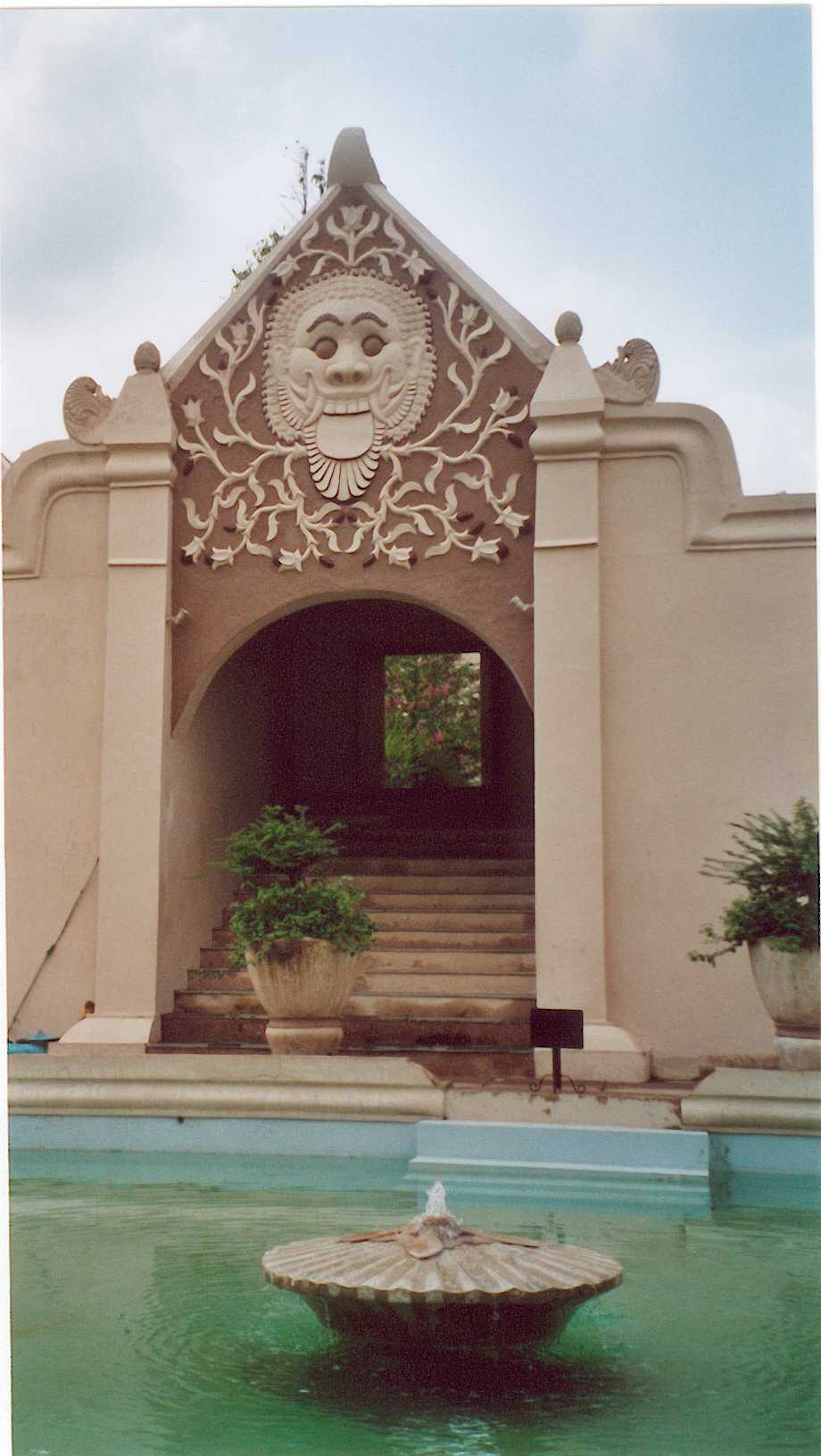 Water palace in Yogyakarta, Indonesia